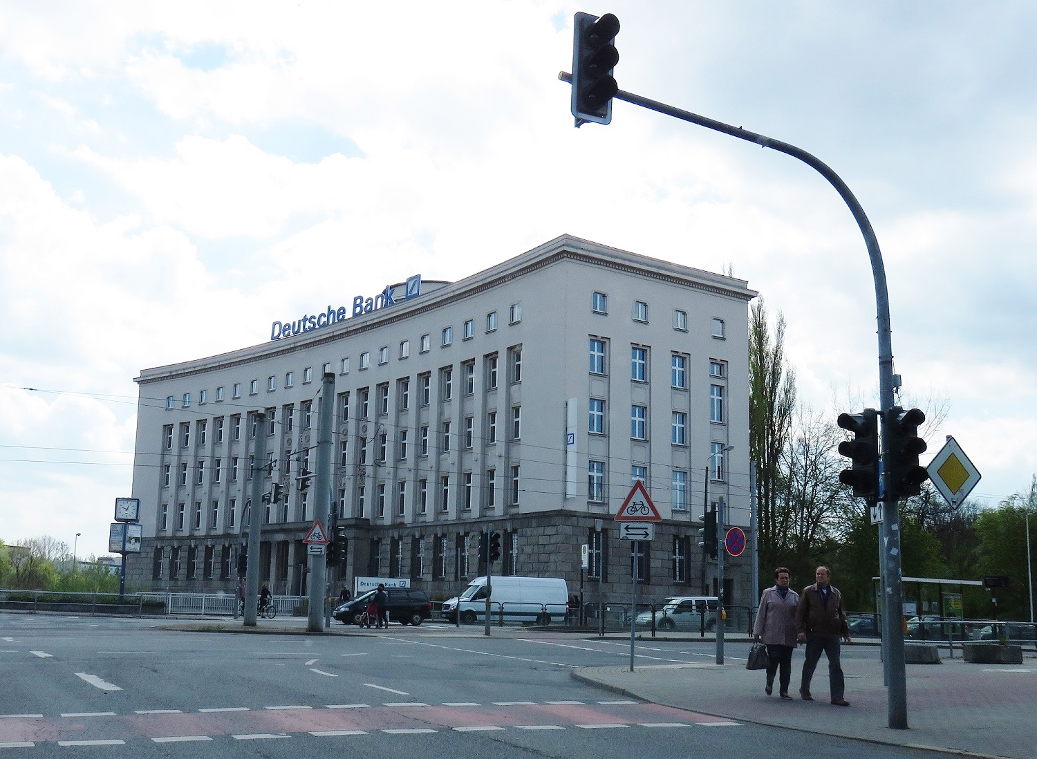 Bank und Bürogebäude im Chemnitzer Zentrum. Kulturdenkmal Chemnitz Zentrum.